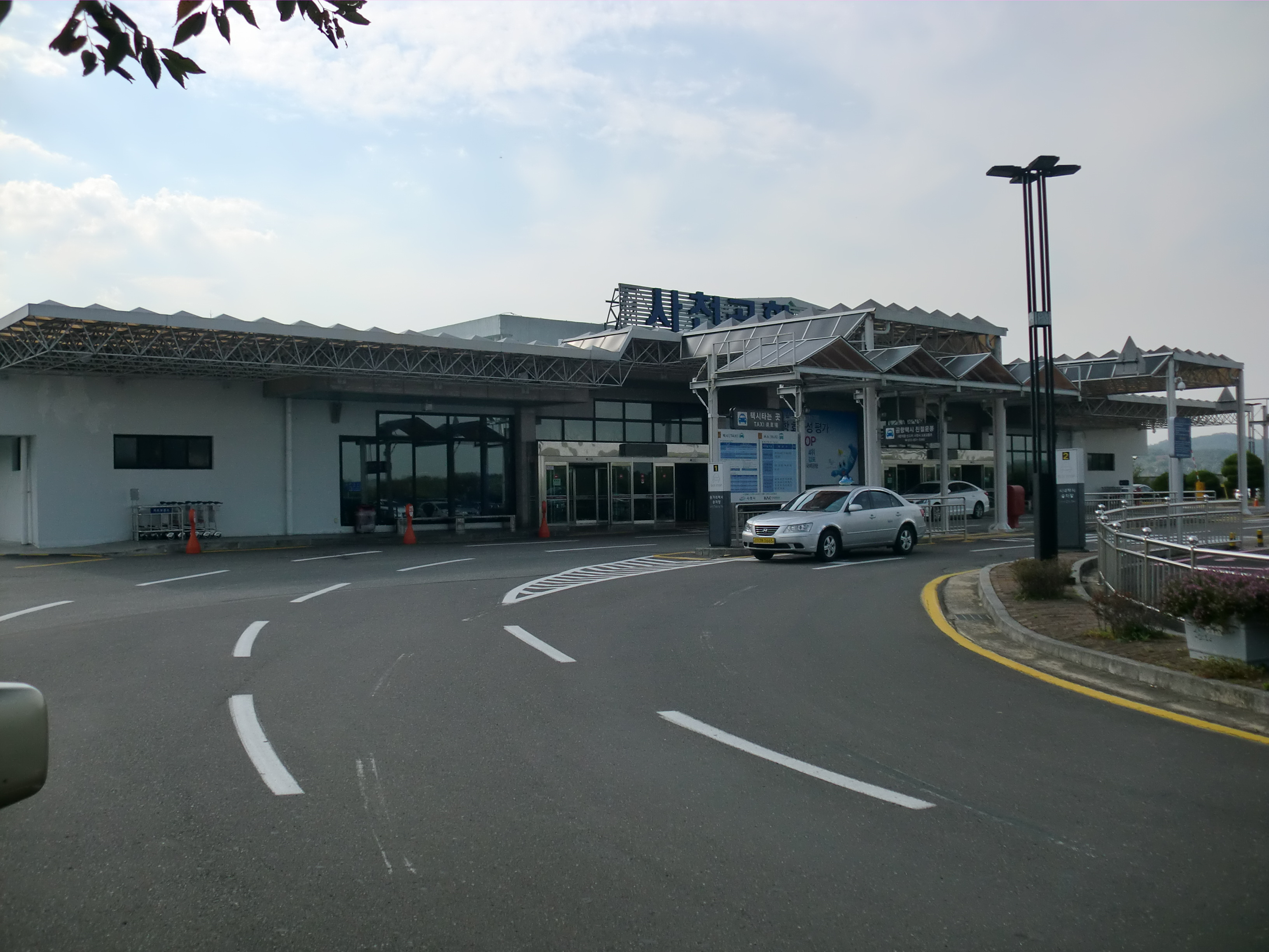 경상남도 사천시에 있는 사천공항